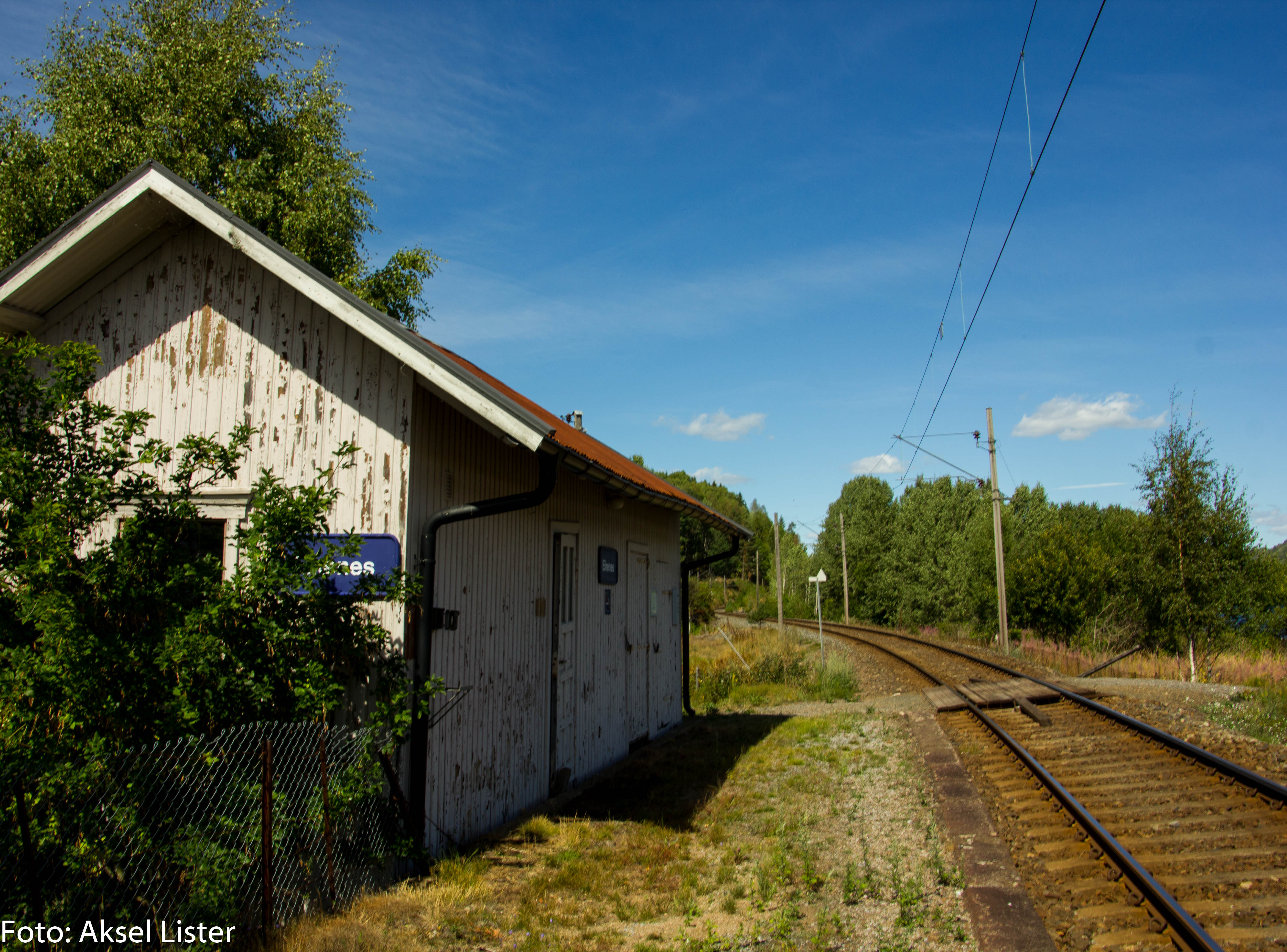 Eikenes stasjon på nest siste driftsdag, 5 august 2018.